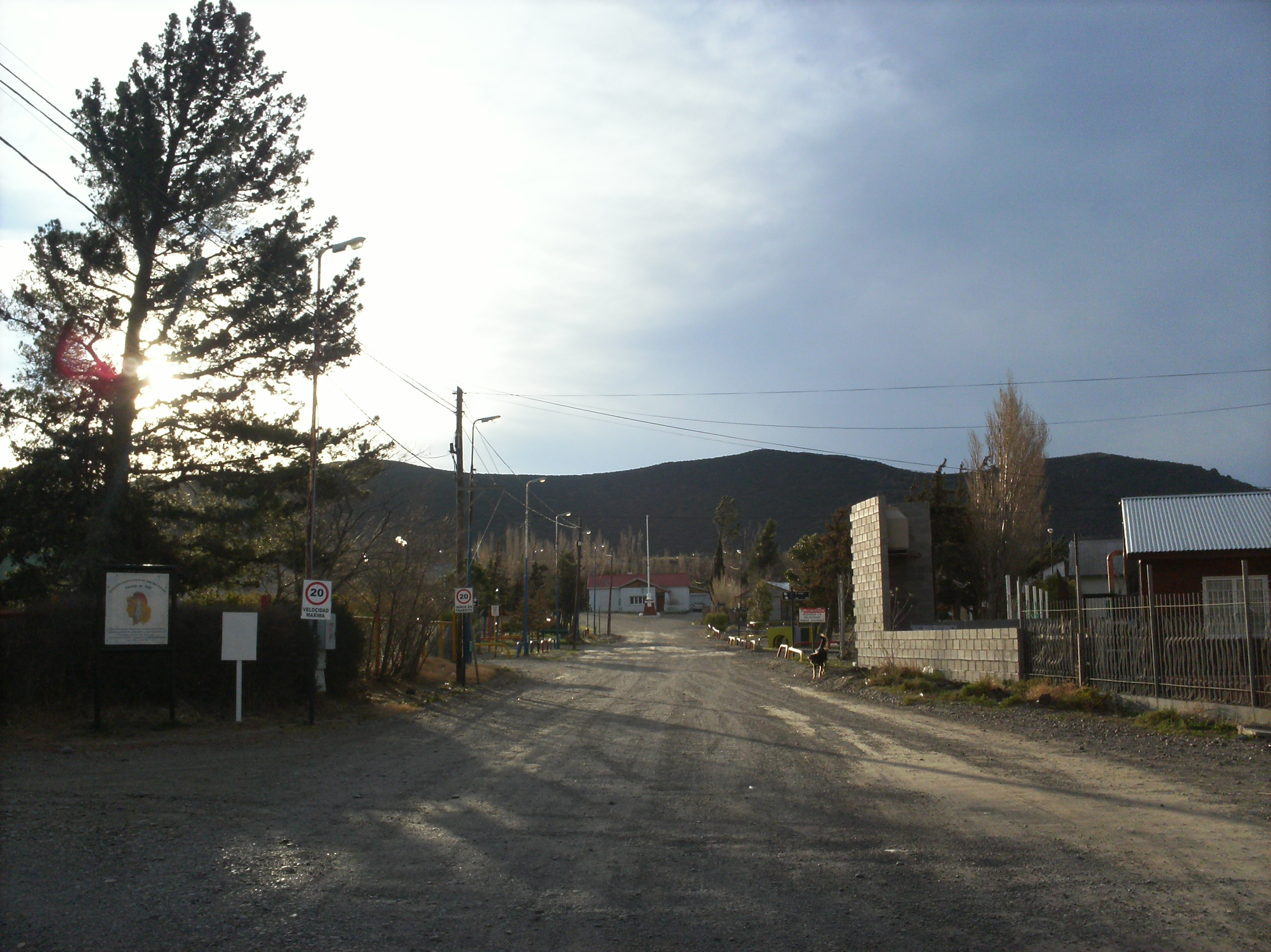 el barrio desde la ruta q va a diadema